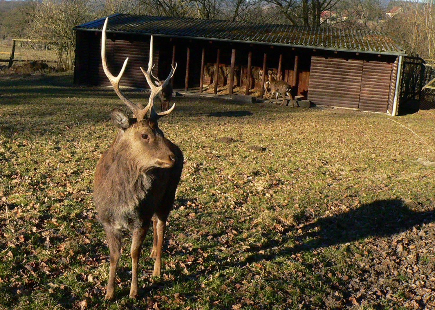 Tierpark Sababurg im Reinhardswald (Hessen), Dybowskihirsch